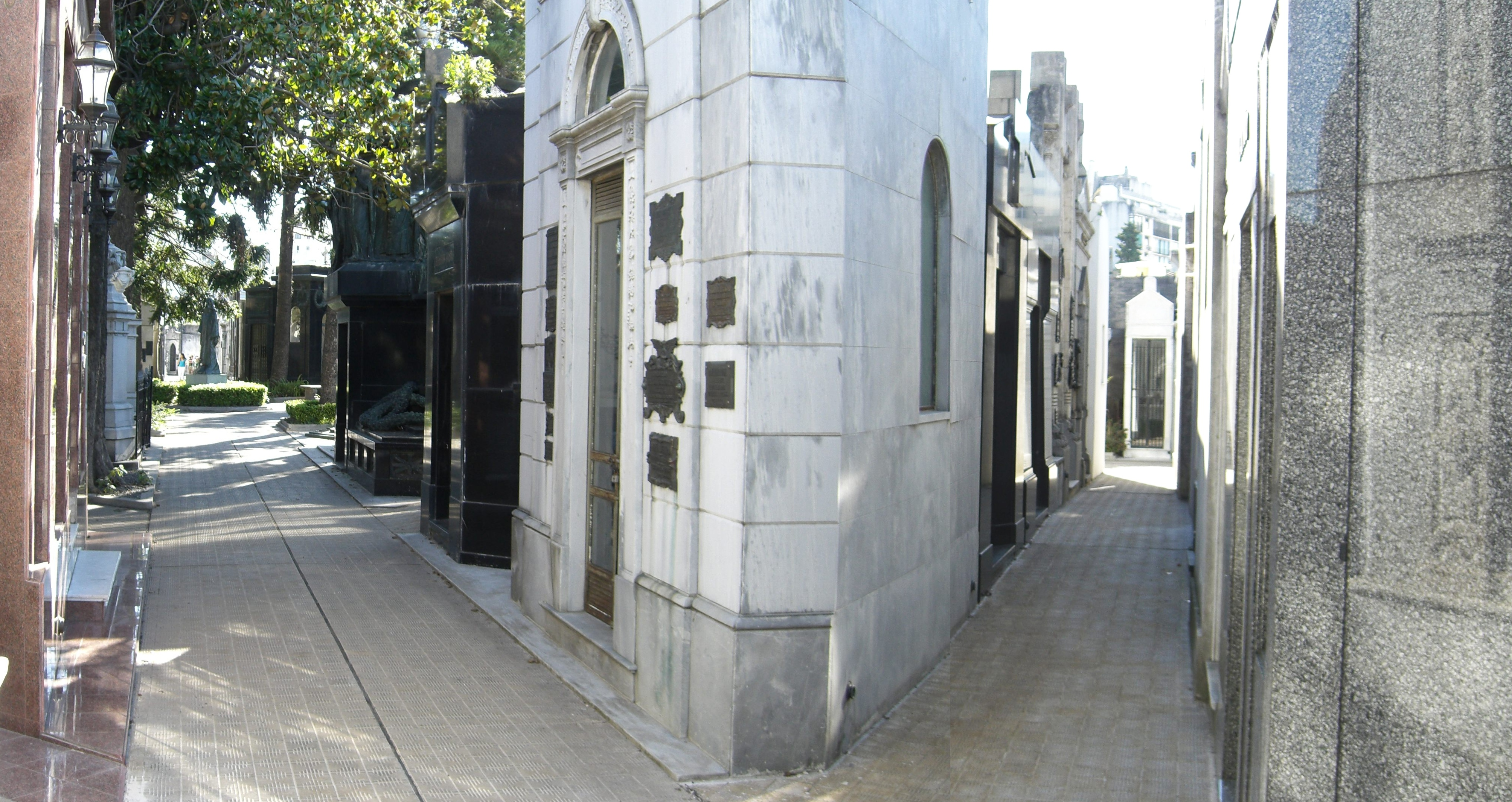 Recoleta Cemetery